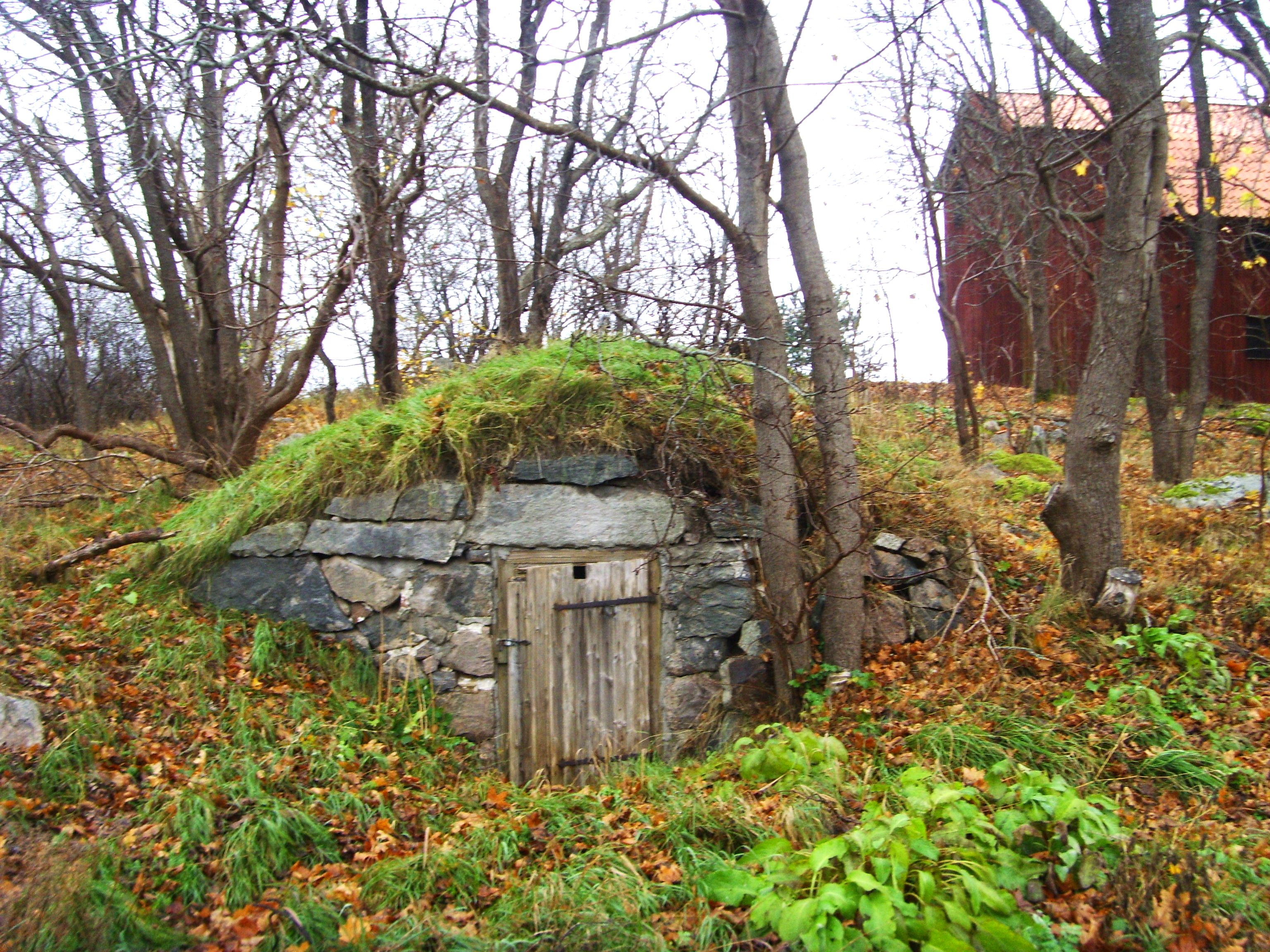 Jordkällare vid Sädesmagasinet i Rejmyre, har tillhört numera rivna äldre arbetarbostäder.